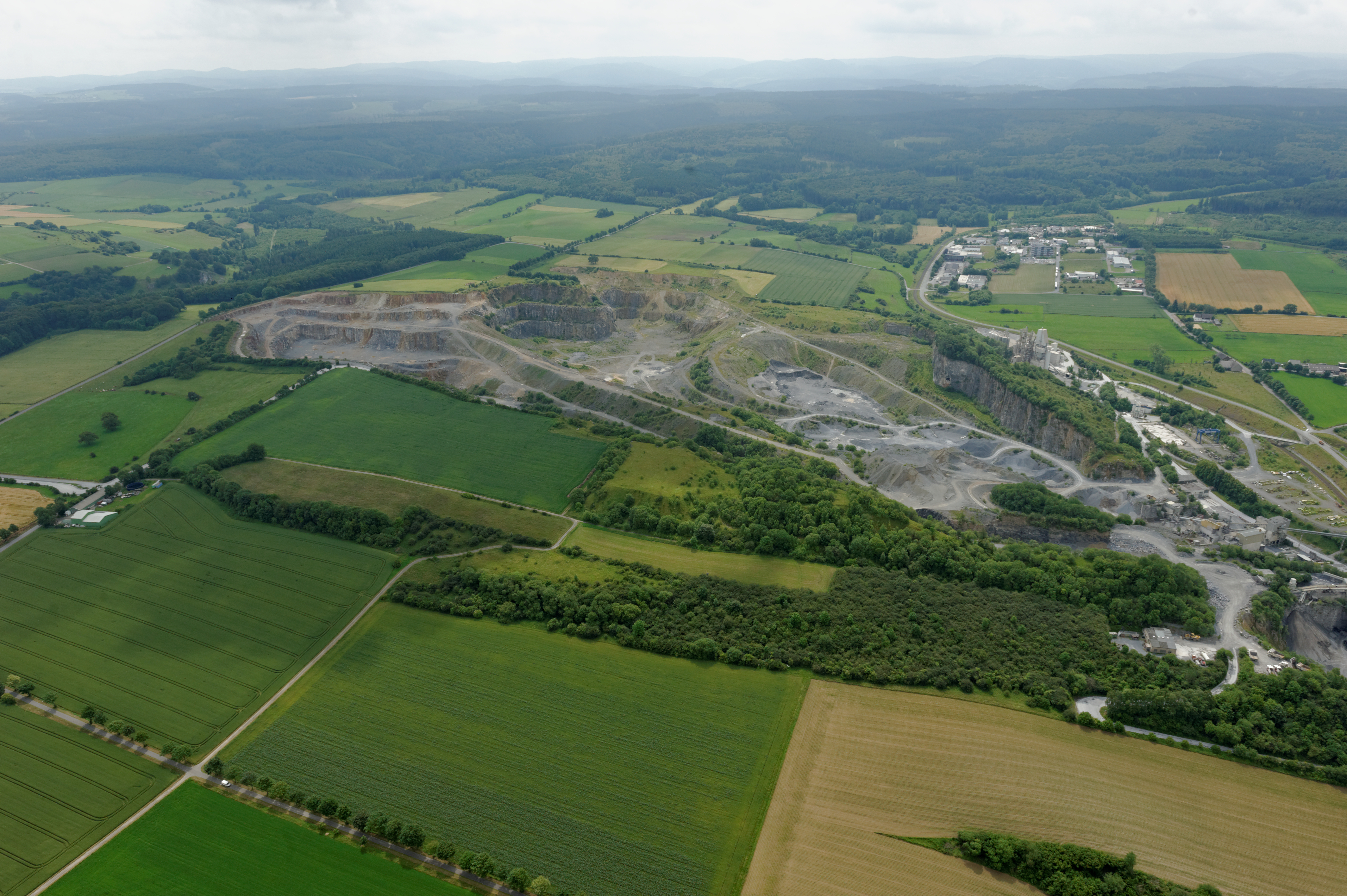 Fotoflug Sauerland Nord. Warstein: Kalksteinbrüche und Kalkwerk Köster-Risse südöstlich von Warstein, Naturschutzgebiet Liethöhle und Bachschwinden des Wäschebaches, Naturschutzgebiet Lörmecketal, Bahnstrecke zur Warsteiner Brauerei bzw. zu Kalkbrüchen, hinten Gewerbegebiet Enkerbruch, Blickrichtung Südost The making of this document was supported by the Community-Budget of Wikimedia Germany.